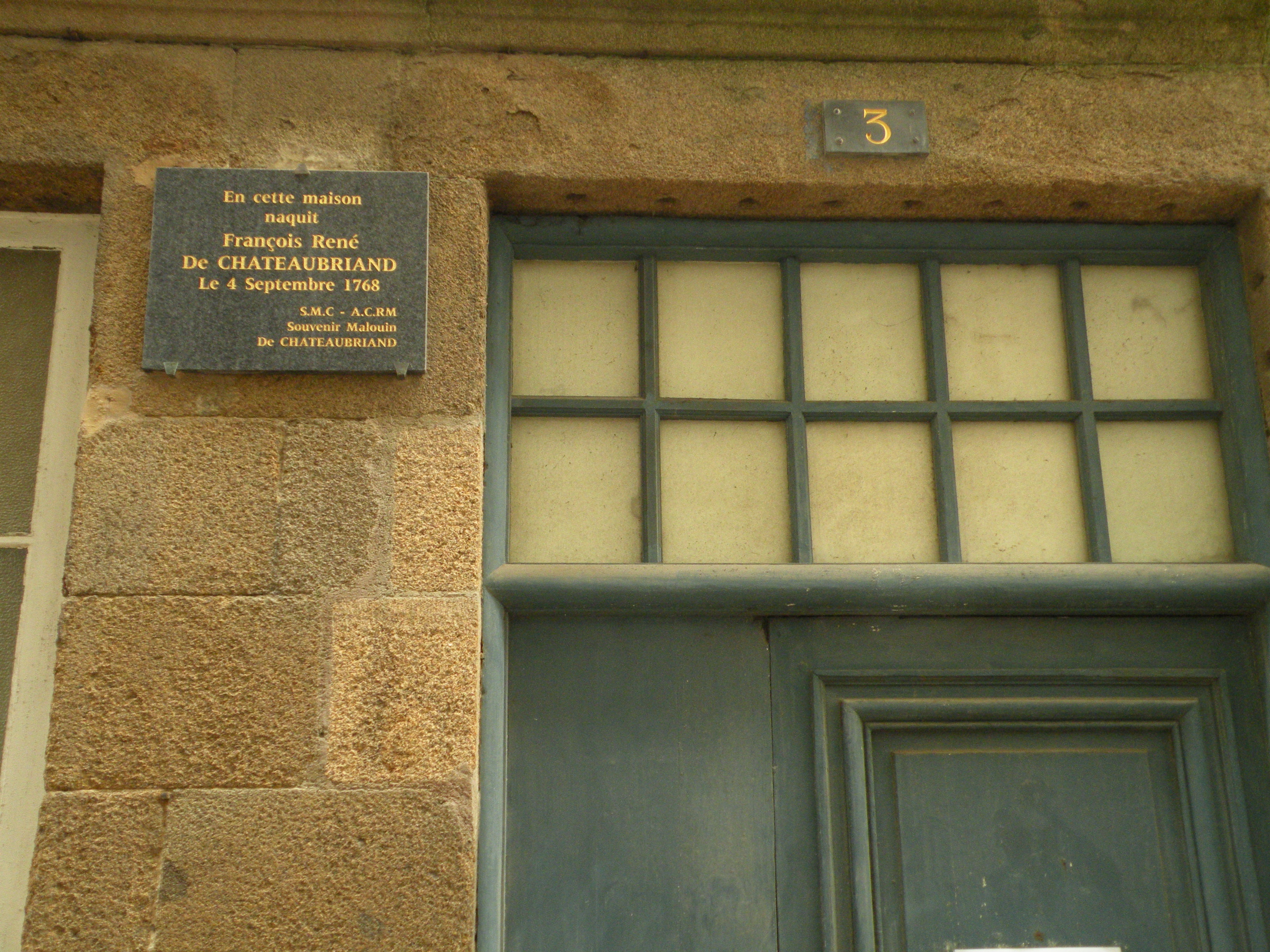 Plaque à l’entrée de l’hôtel de la Gicquelais, 3 rue de Chateaubriand à Saint-Malo. Maison natale de François-René de Chateaubriand.